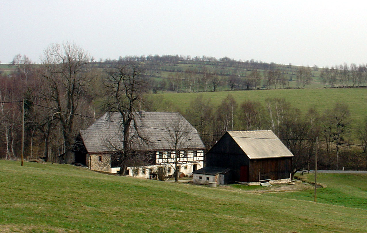 Müglitz (Sachsen, Erzgebirge): teilrestaurierte Mühle